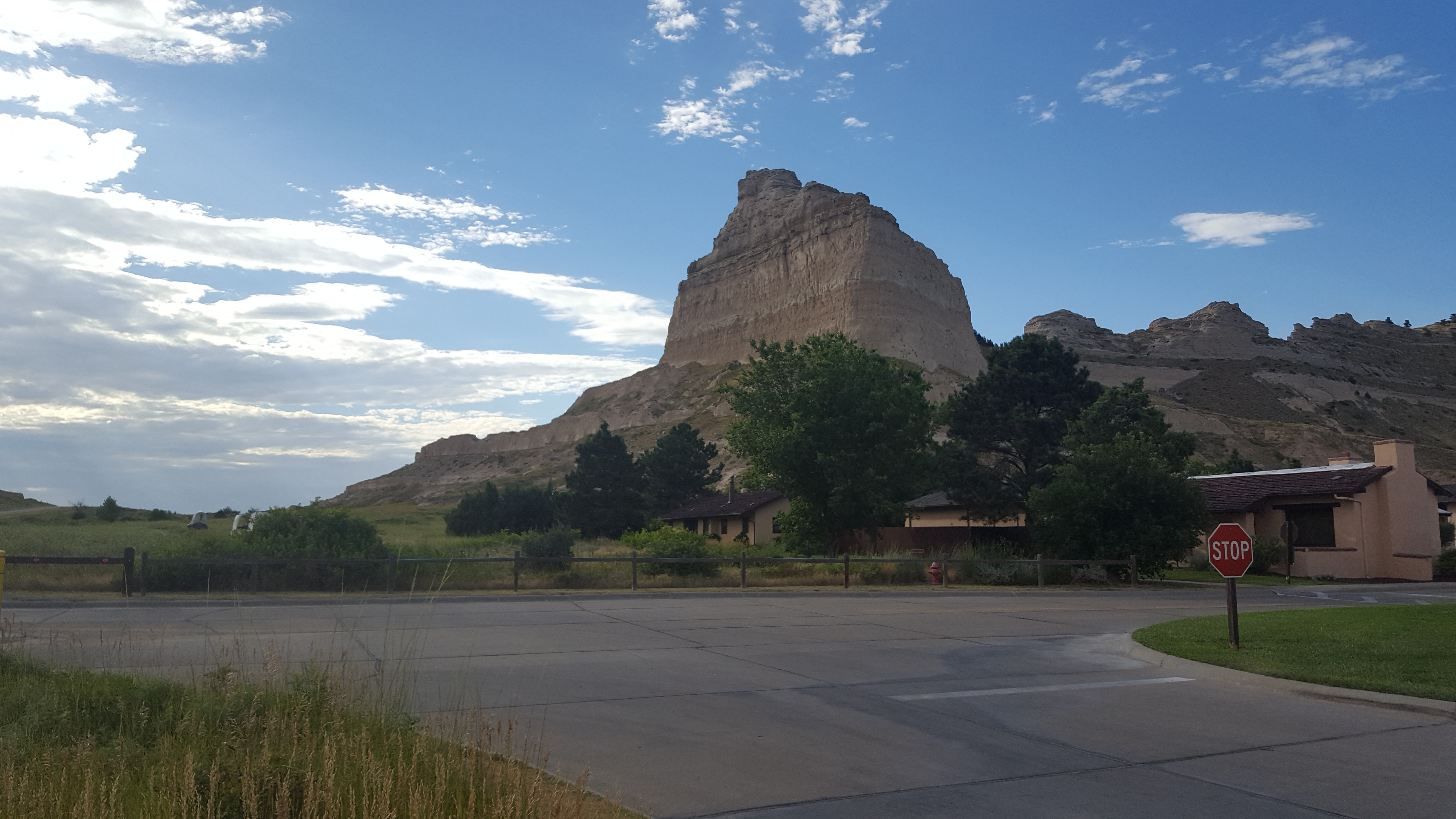 Eagle Rock, es el mejor sitio para estudiar la historia geológica de Scotts Bluff